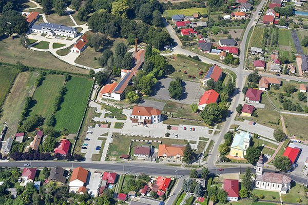 Kállósemjén, Kállay kúria - légi felvétel